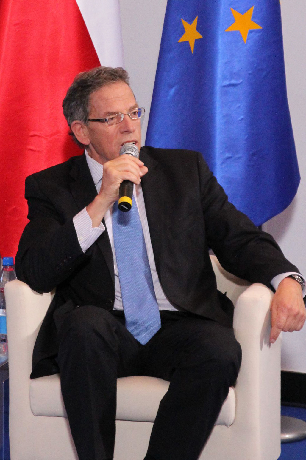 Konferencja "Zapytaj Platformę" w Centrum Obywatelskim